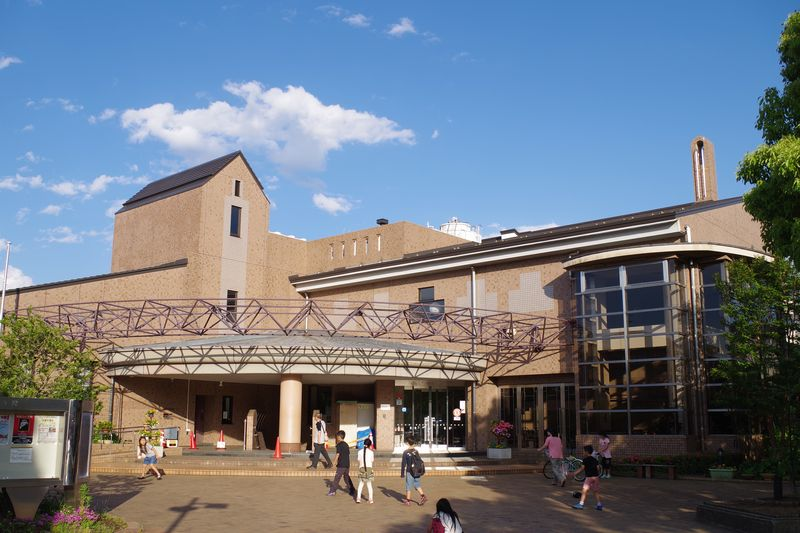 多摩市聖ヶ丘のコミュニティセンター「ひじり館」（2016/06/02撮影）